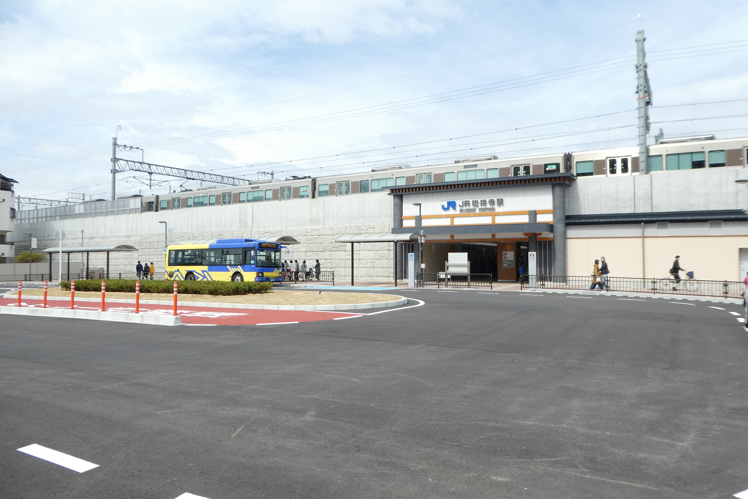 東海道本線（JR京都線）JR総持寺駅南口。